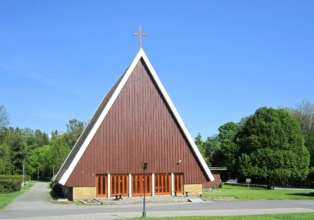 Jeløy kapell på Jeløy kirkegård